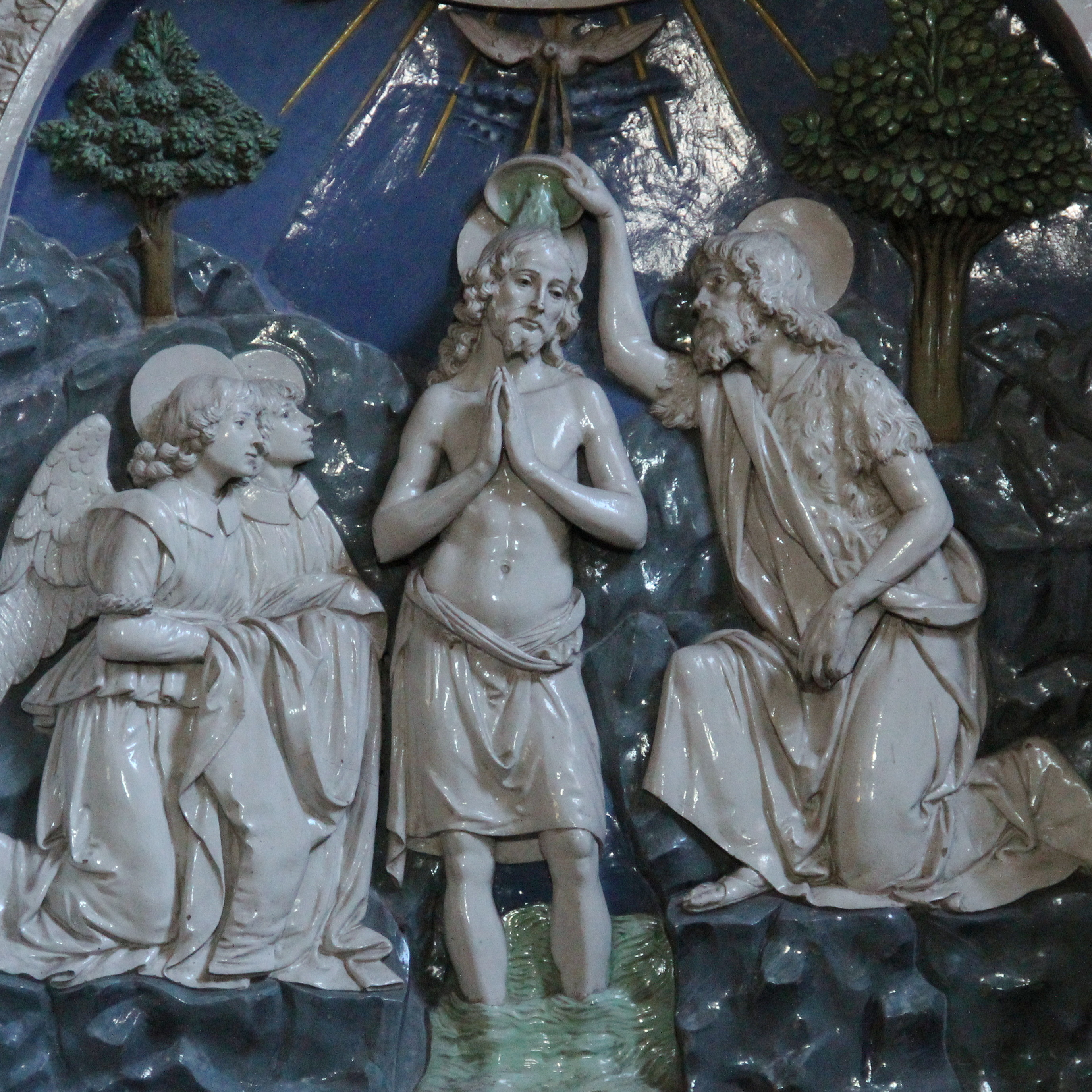 Pieve delle Sante Flora e Lucilla, Santa Fiora, Italy - Andrea della Robbia's work